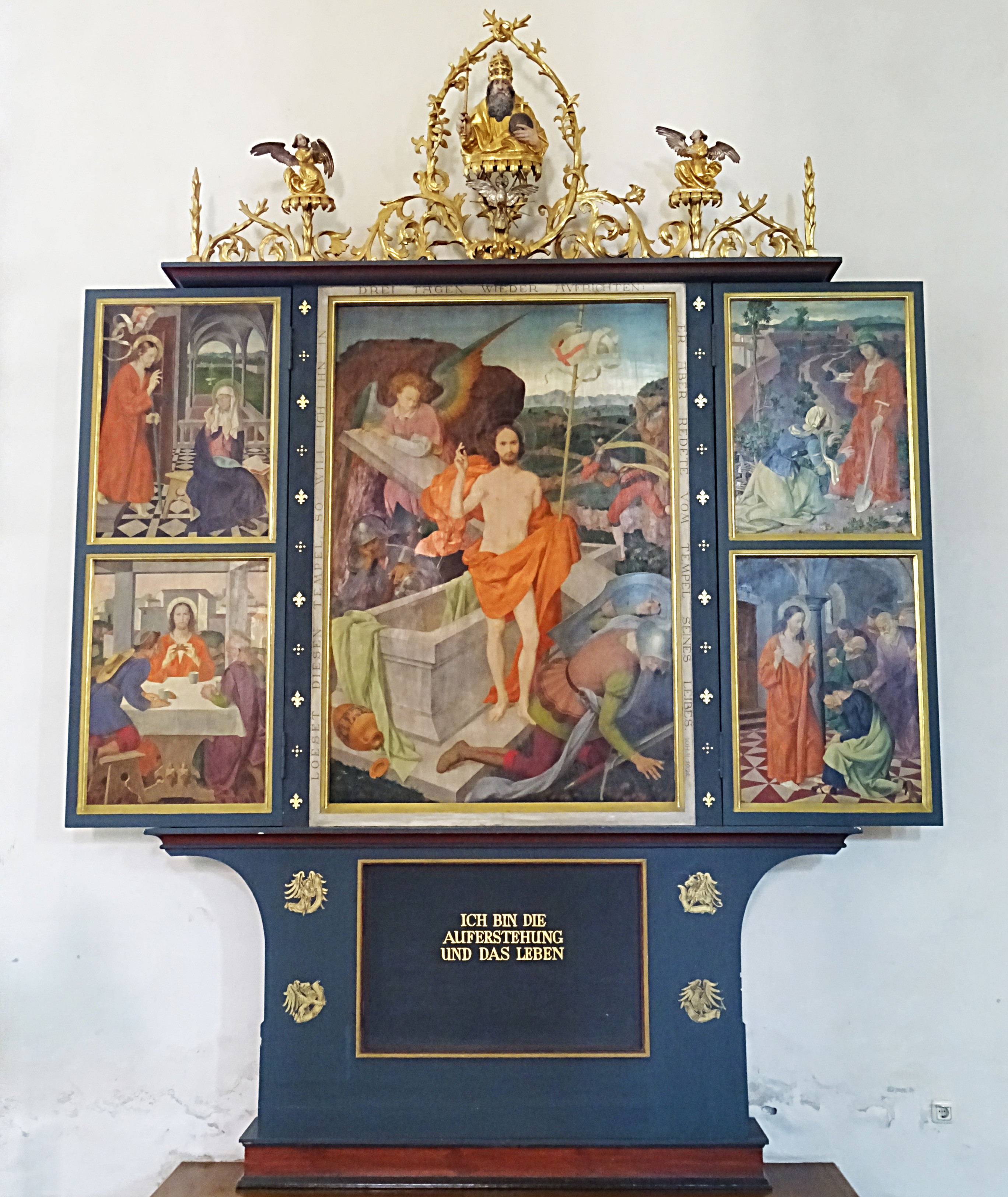 Auferstehungsaltar in der Stadtpfarrkirche Mariä Himmelfahrt (Bad Königshofen im Grabfeld). Den neuzeitlichen Flügelaltar im Seitenschiff zum Thema Auferstehung, schuf in sechsjähriger Arbeit Professor Theo Baierl.[1]